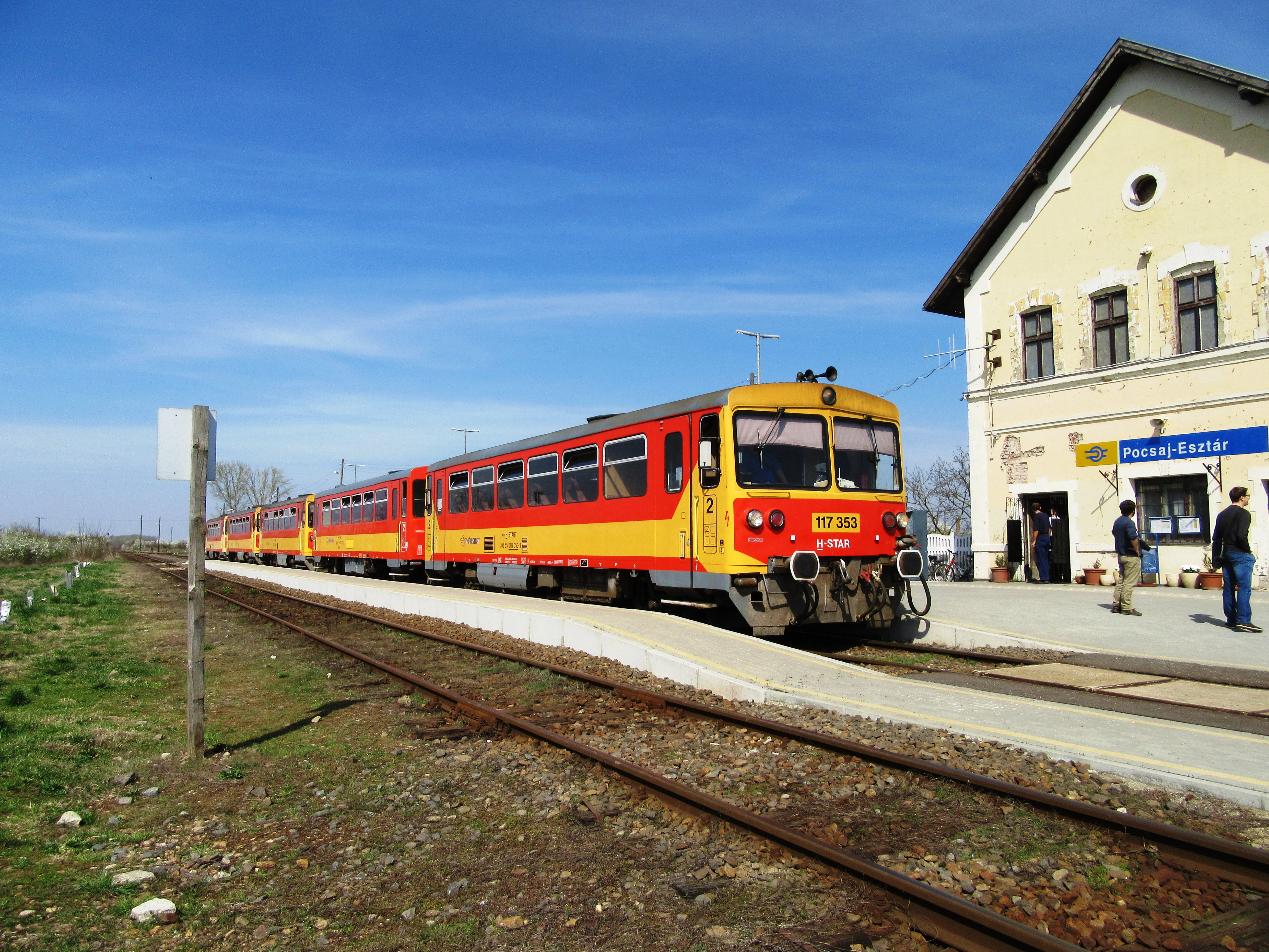 BZmot motorvonat 117 353